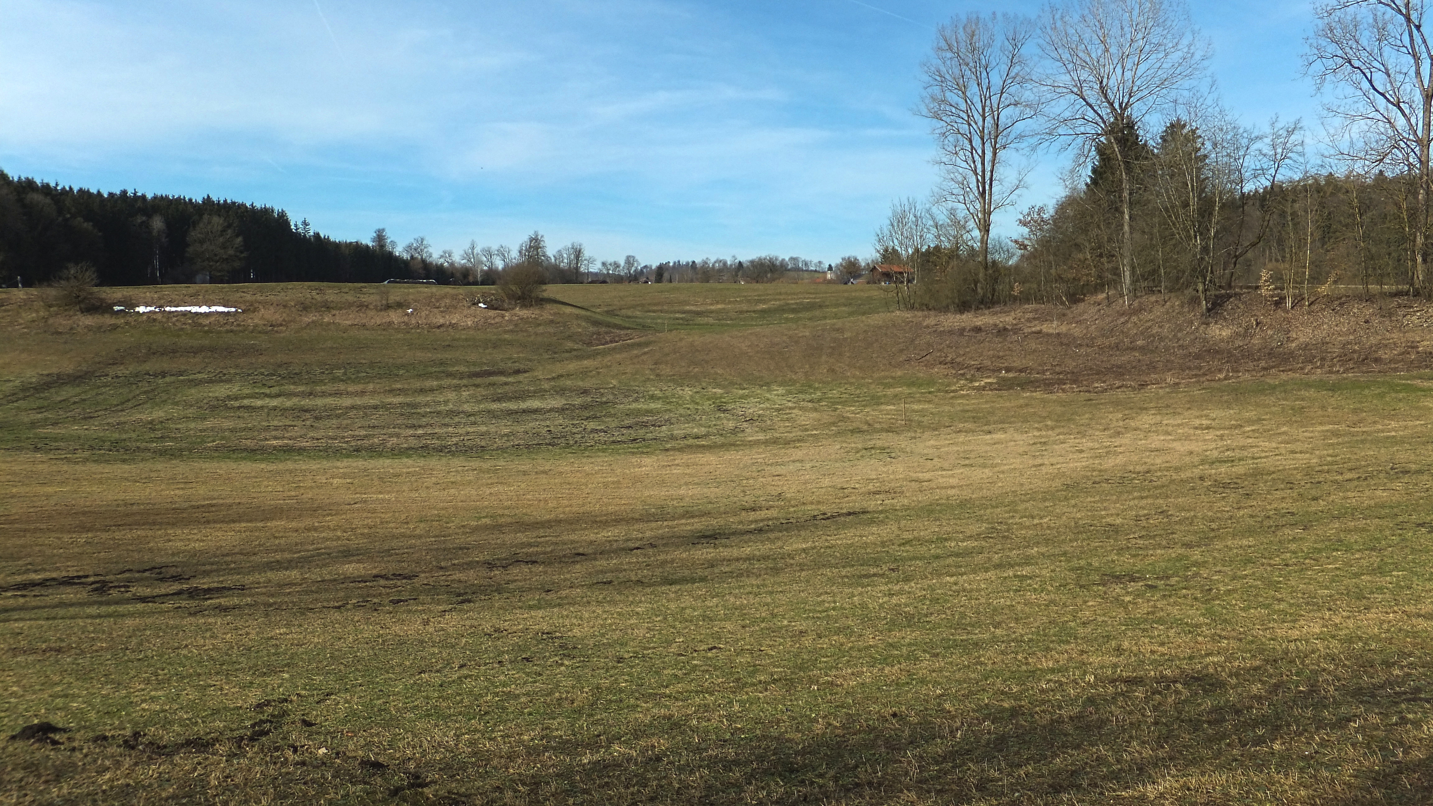 Geotop 189R025, Schluckloch Eglsee, Blick von Ost nach West, am 06.03.2019 trocken gefallen